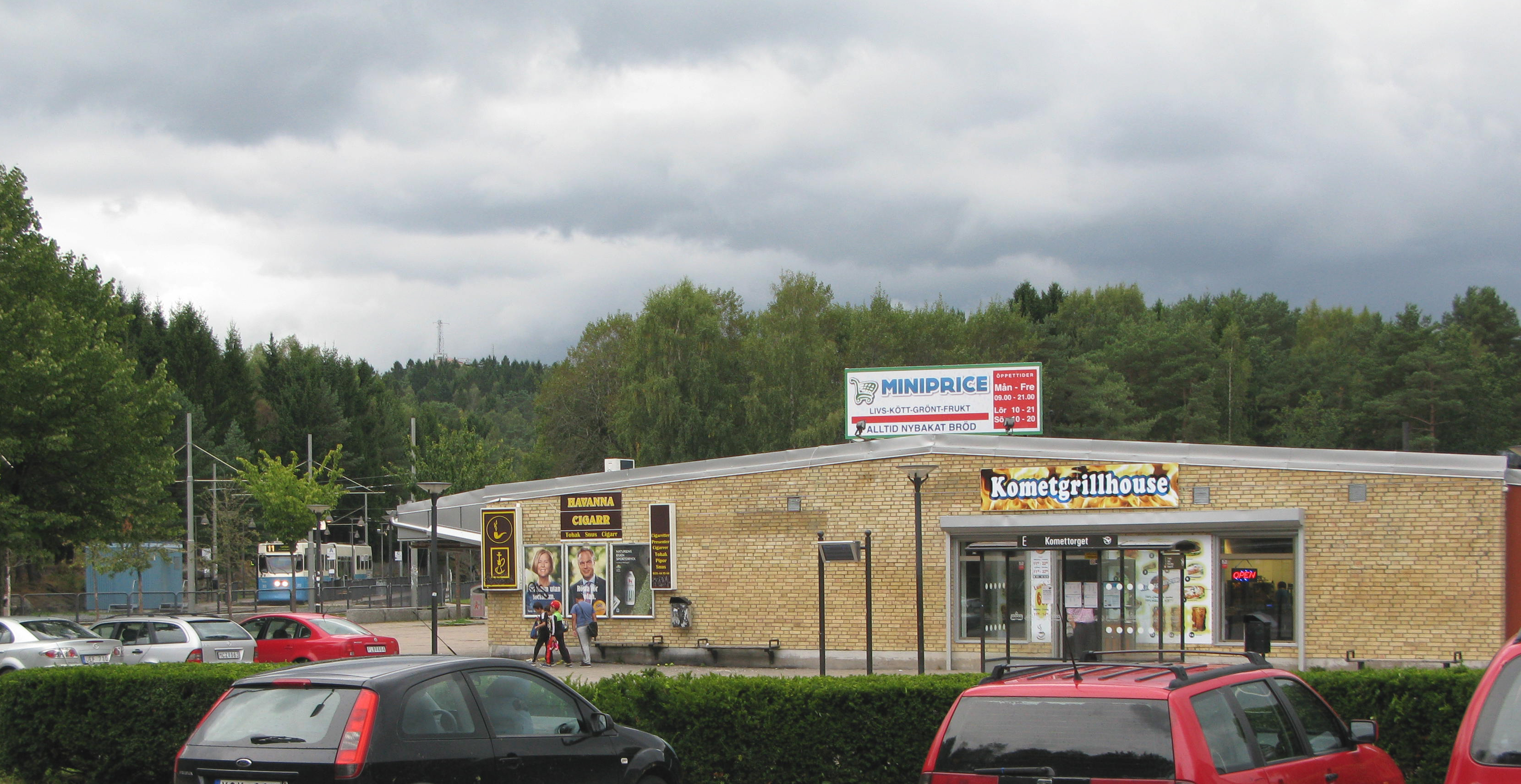 Centrumbyggnad vid Komettorget, Bergsjön, Göteborg.